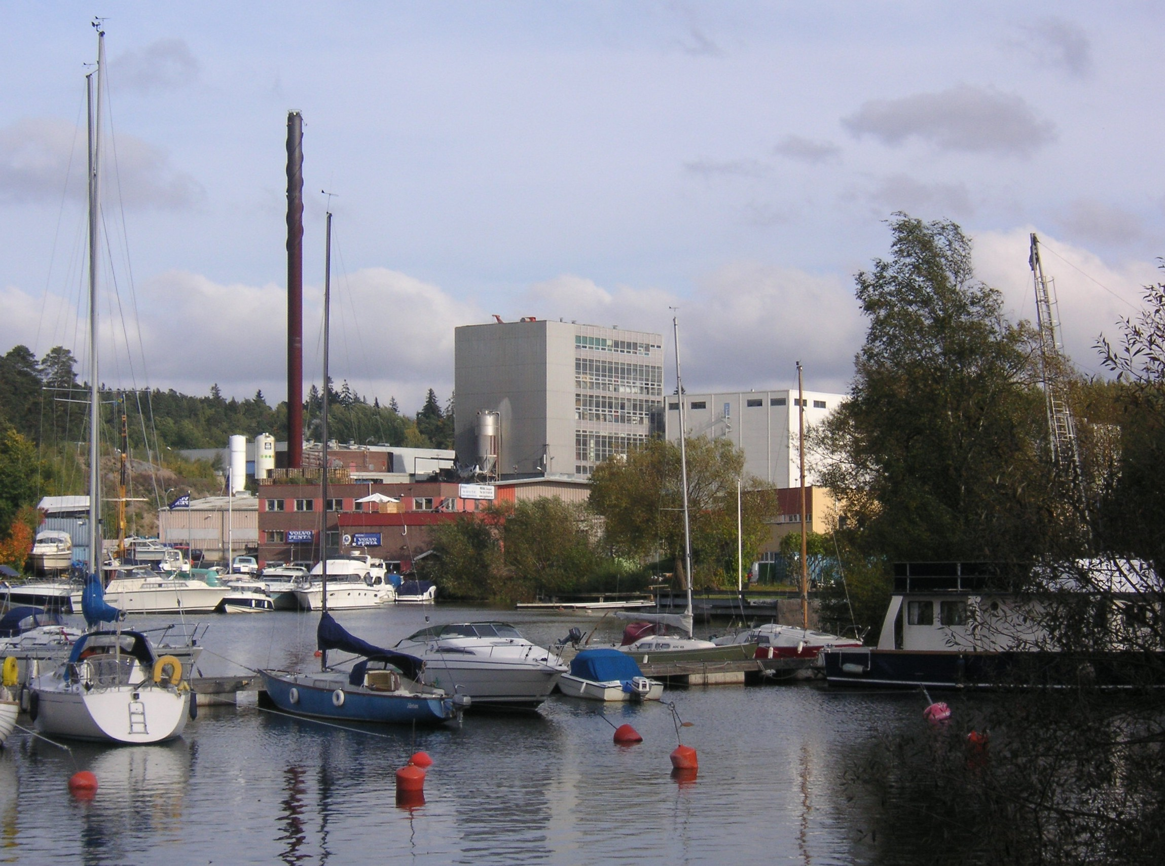 Spendrups bryggerier vid Vårbyfjärden